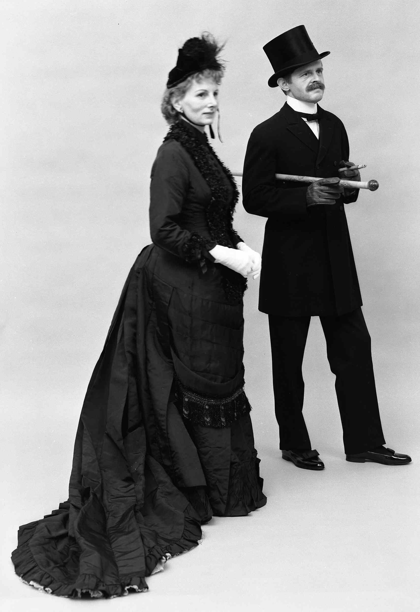 Spanish; Dinner dress